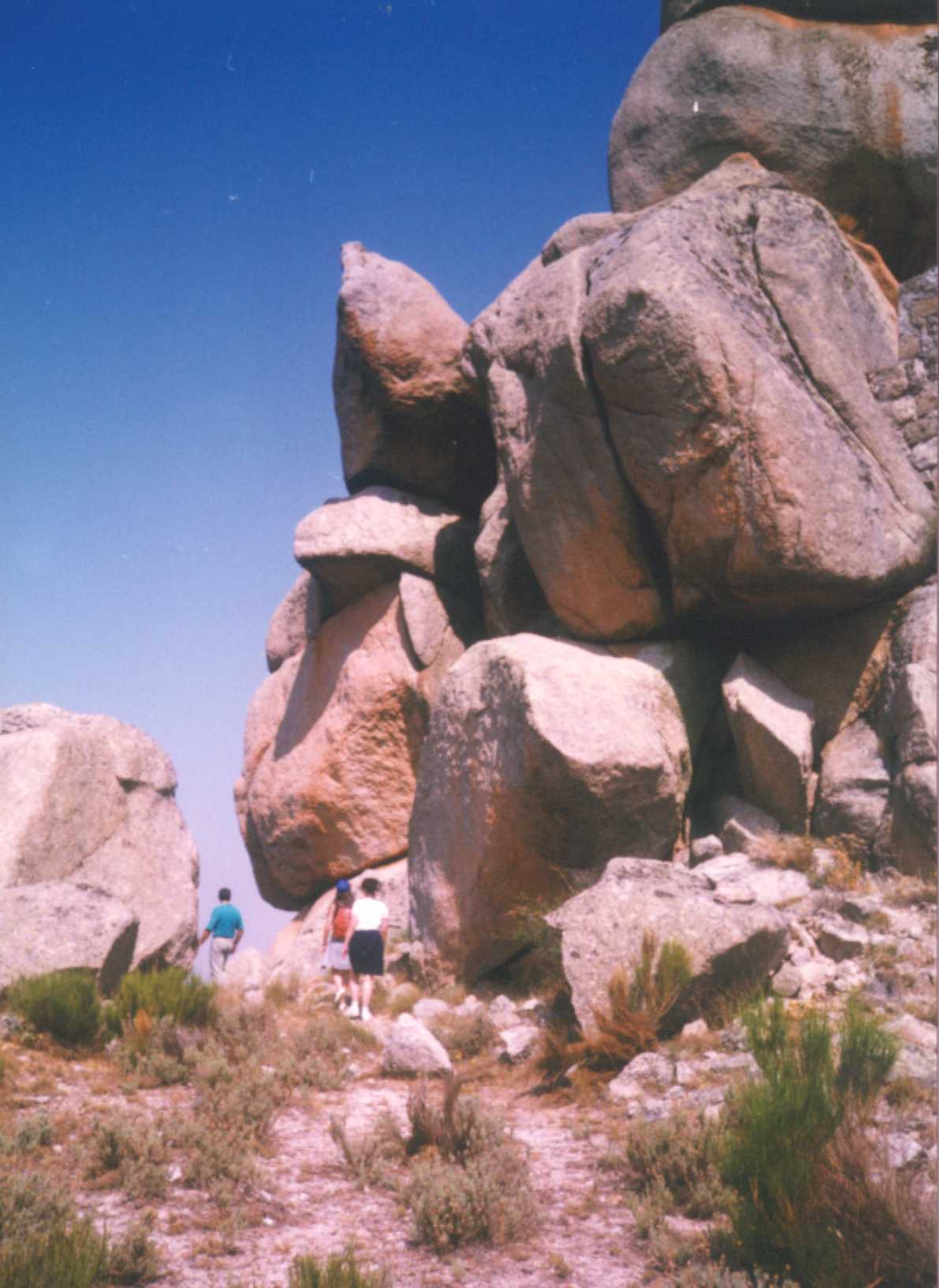 Castillo de Manqueospese (Ávila, España)